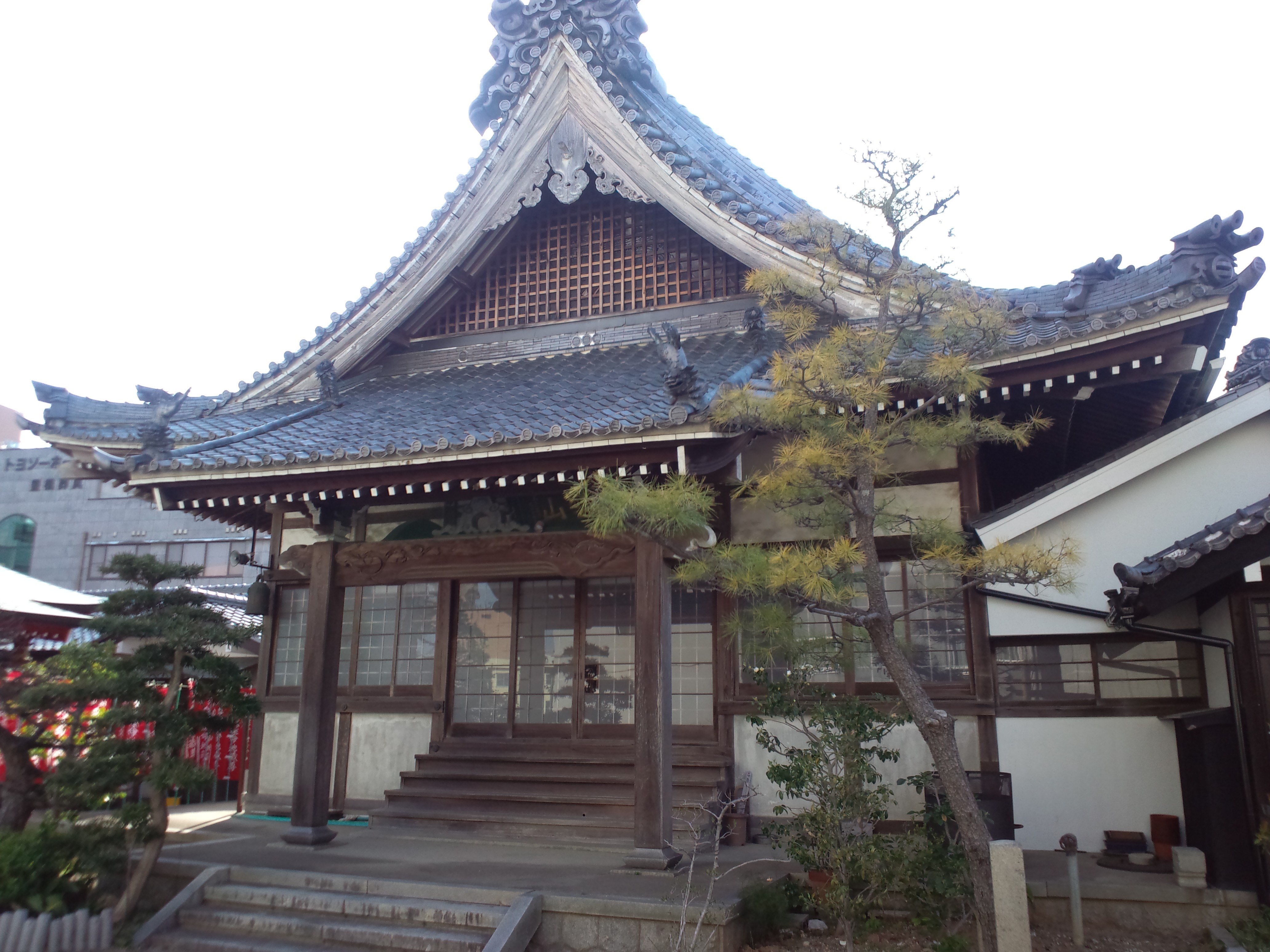 神宮寺 拝殿